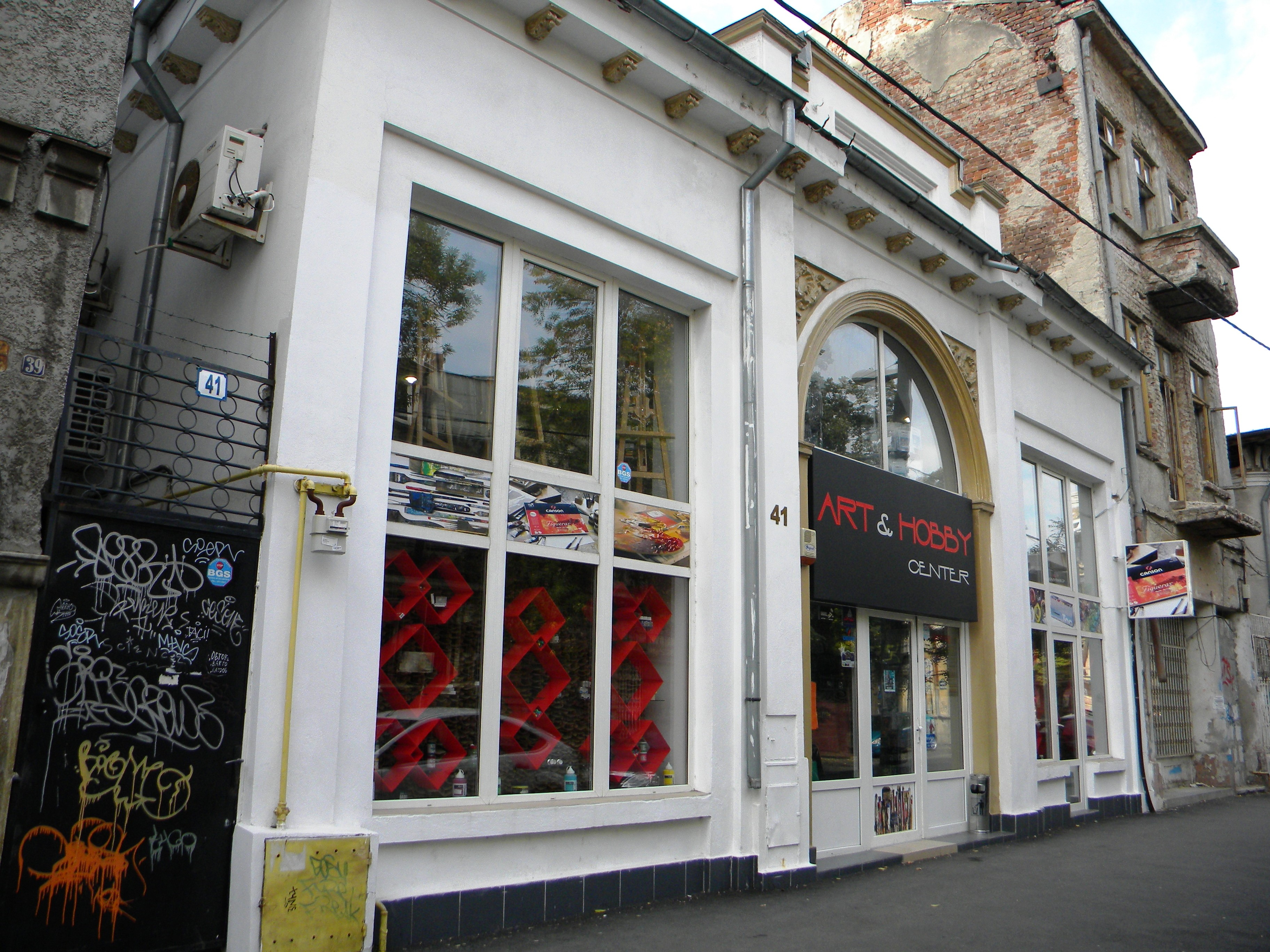 Bucuresti, Romania, Casa pe Calea Grivitei nr. 41, sect. 1